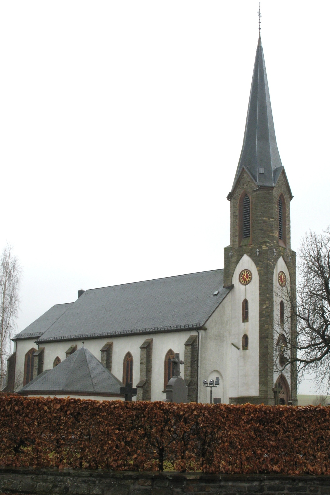 Kierch vu Kierchen am Februar 2009.